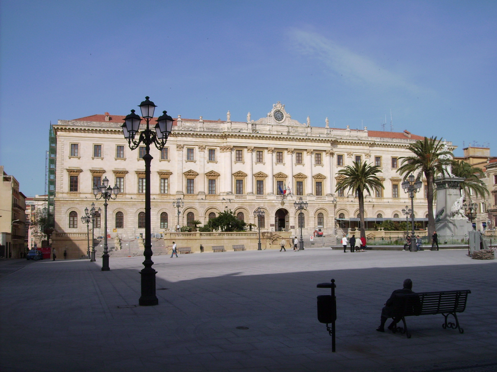 Palazzo_della_Provincia, Sassari, Sardinien